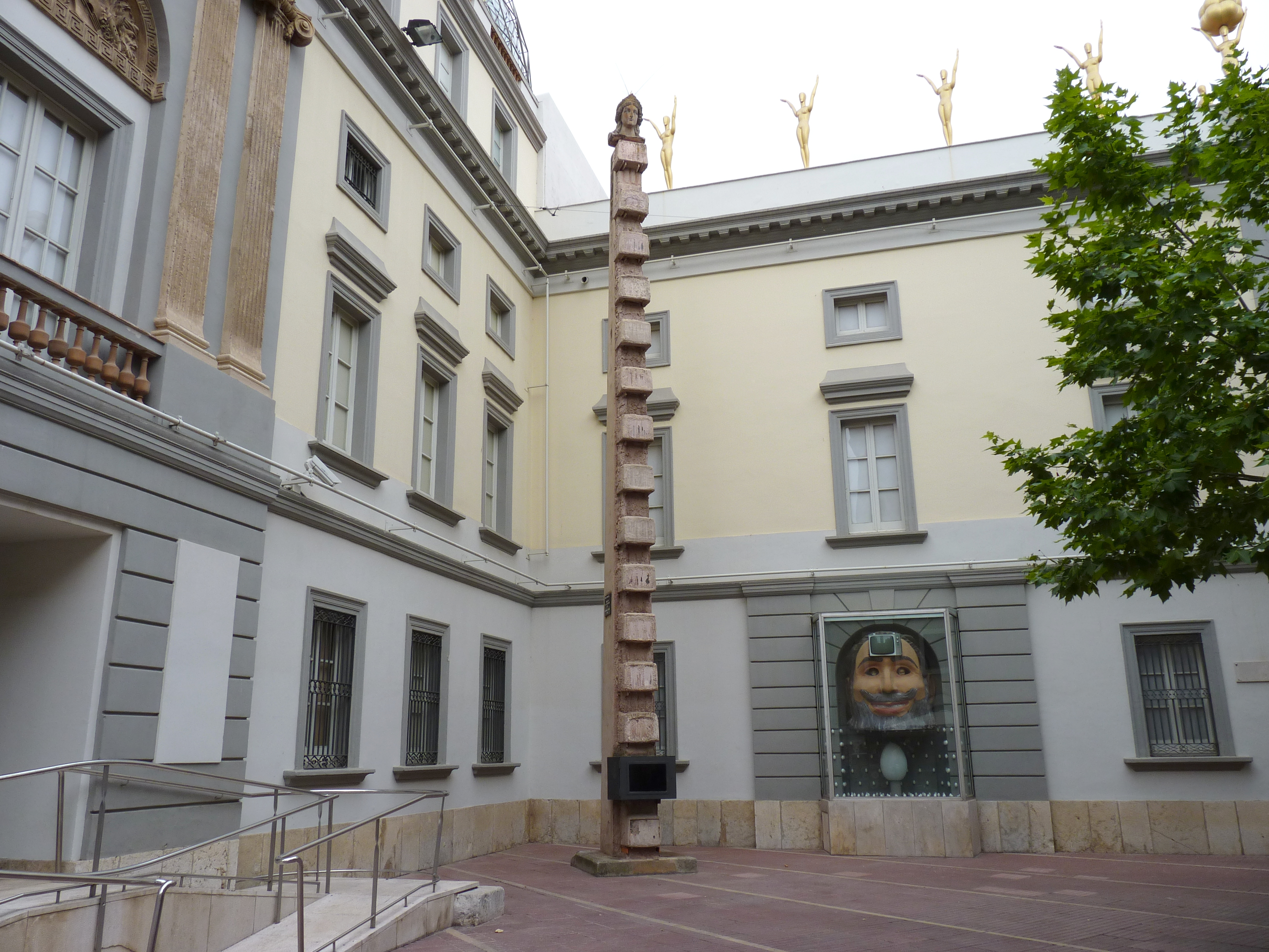 Obélisque de la télévision (Wolf Vostell) et Théatre-Musée Dalí, Figuères (Haut-Ampurdan, Gérone, Catalogne, Espagne)